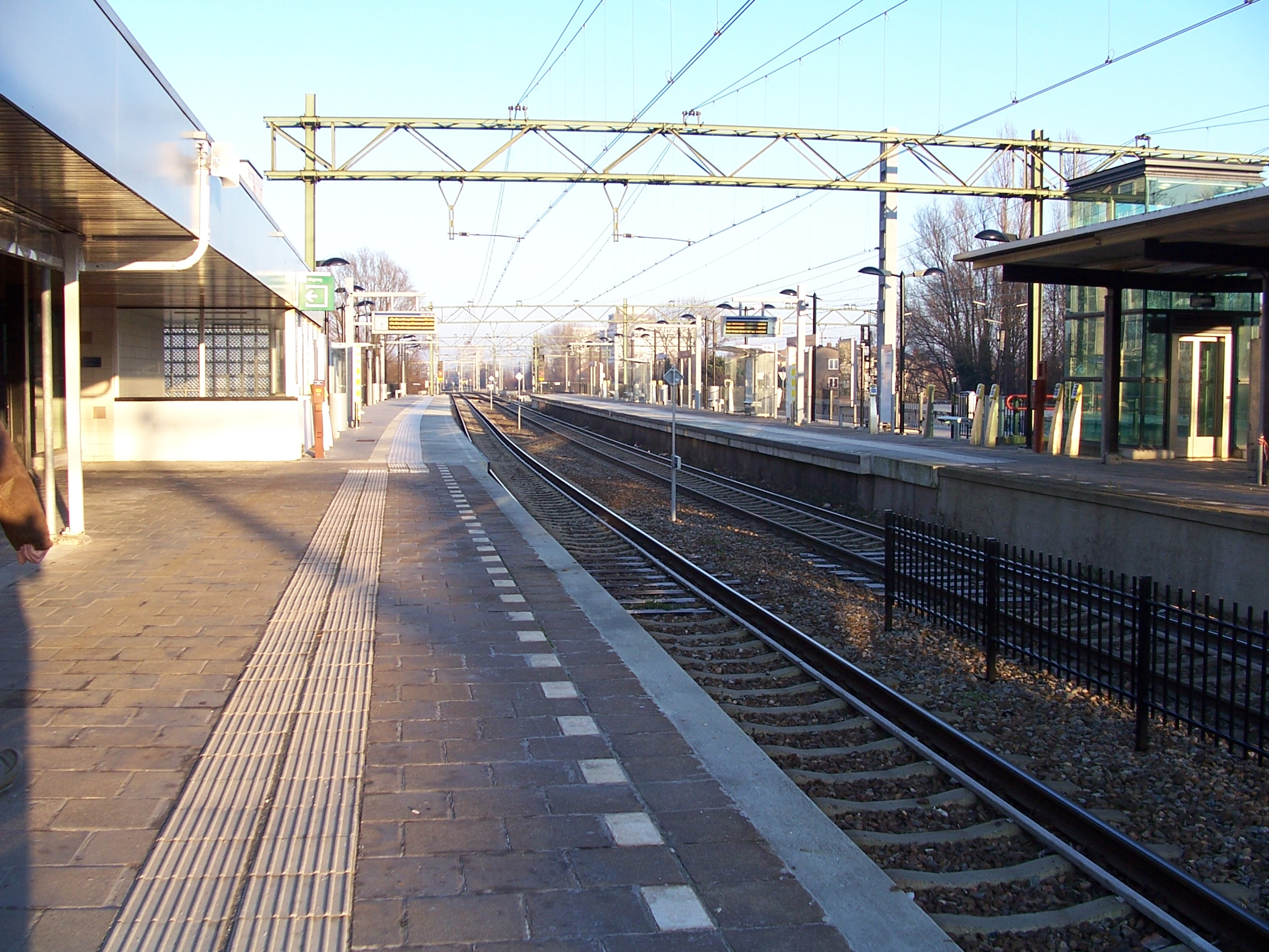 Station Laan van NOI RandstadRail - Den Haag - 2007